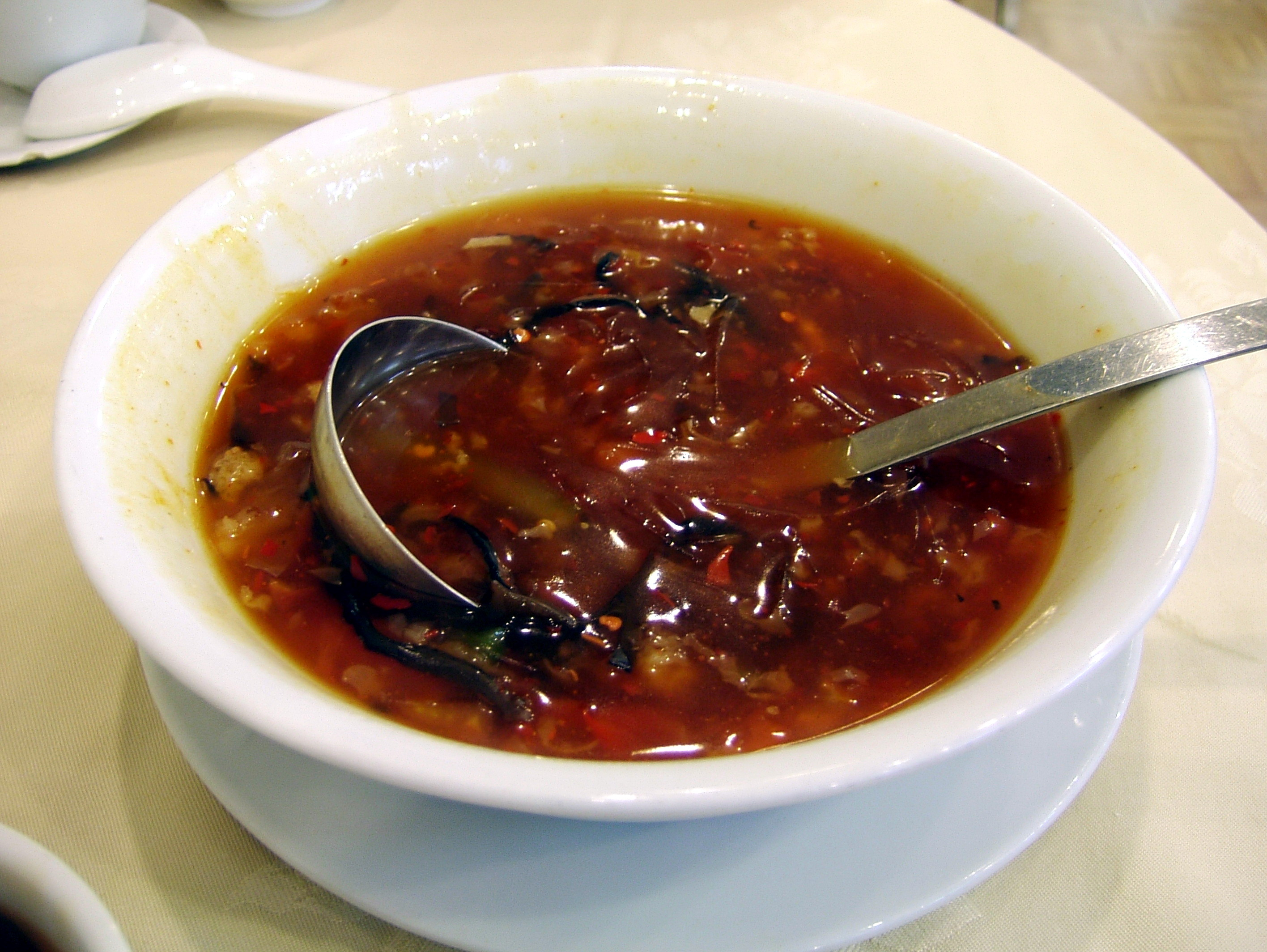 Soupe aux ailerons de requins végétarienne faite avec des nouilles et des champignons.